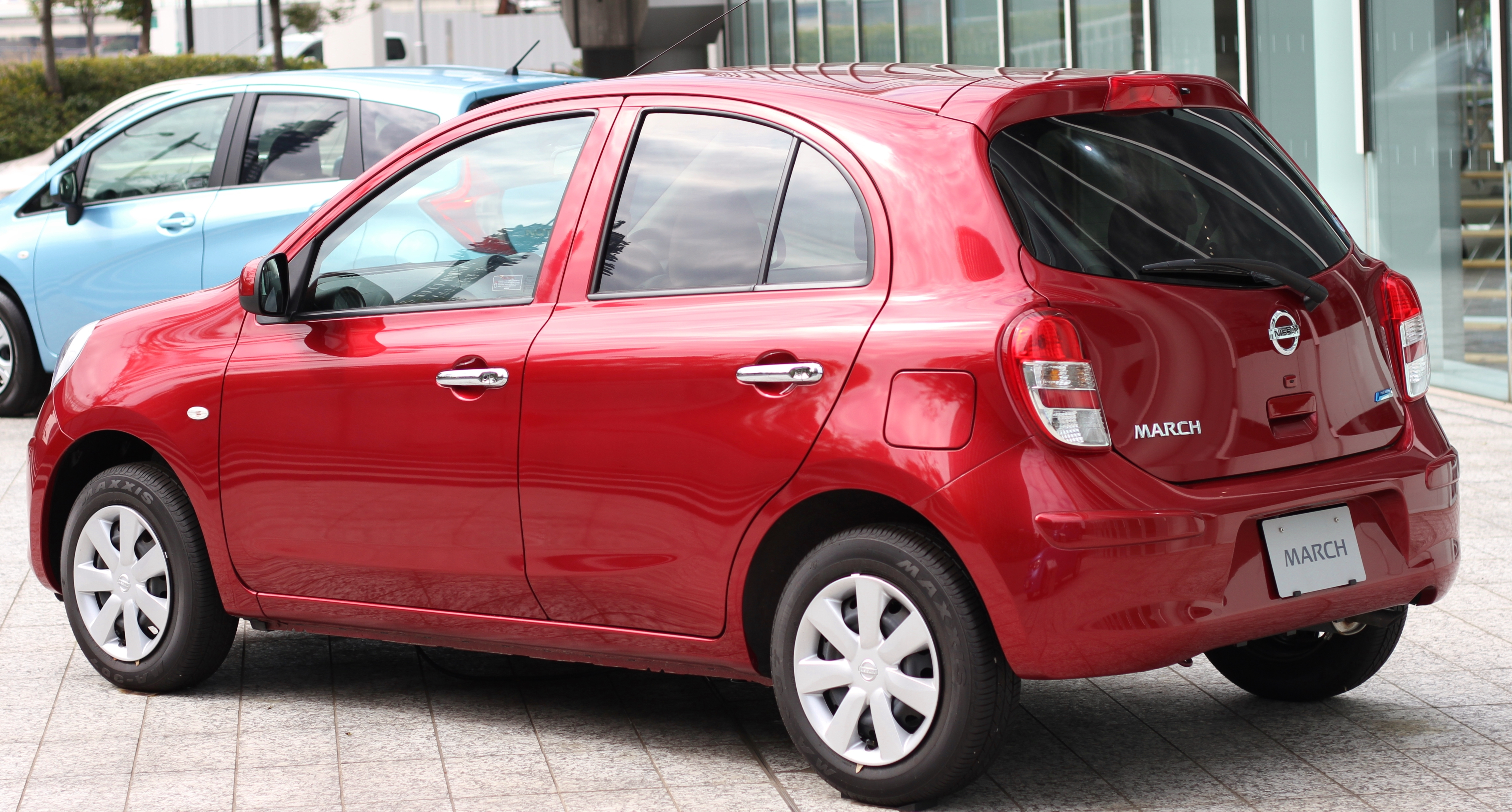 Nissan March